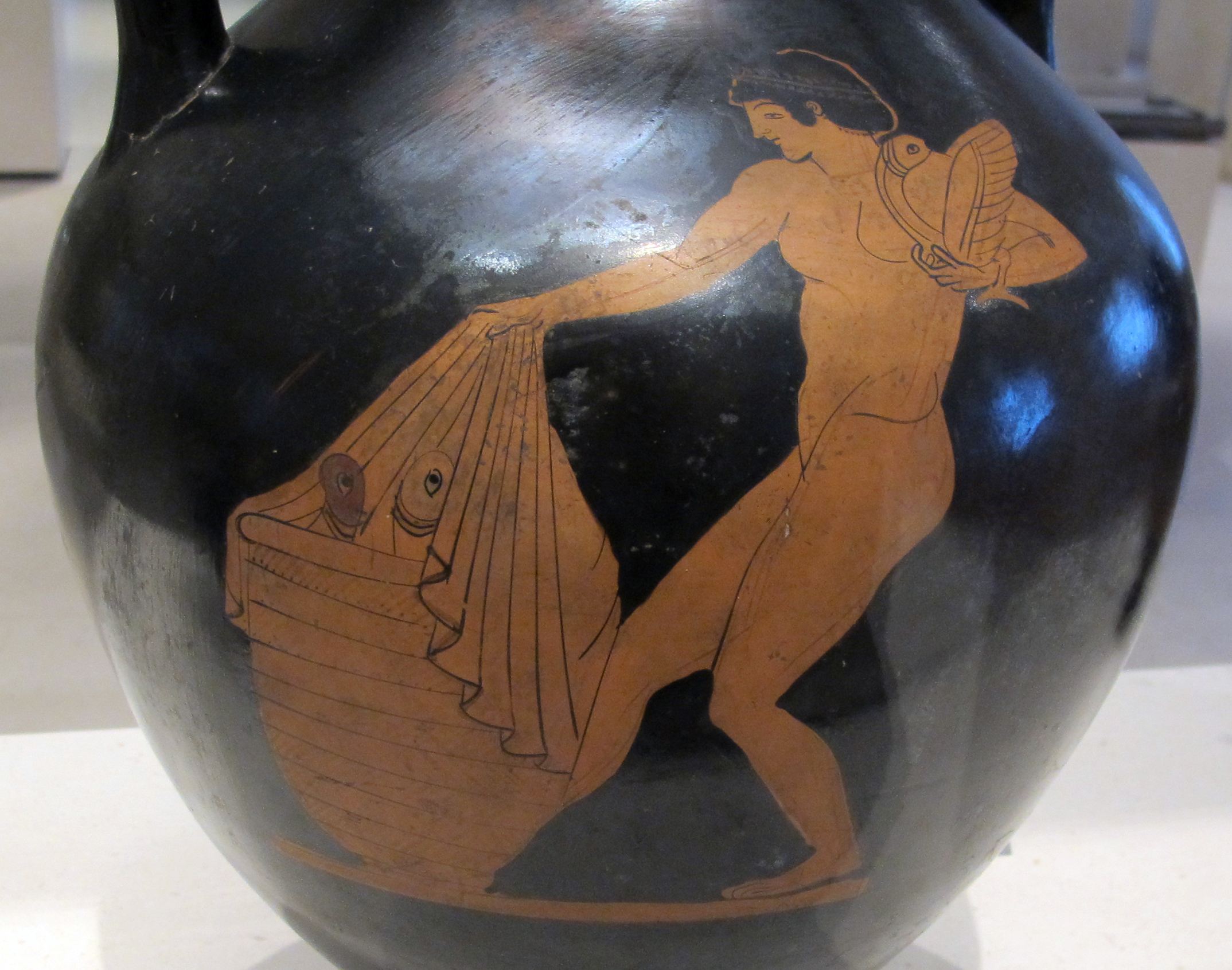 Arte greca, Petit Palais, Parigi